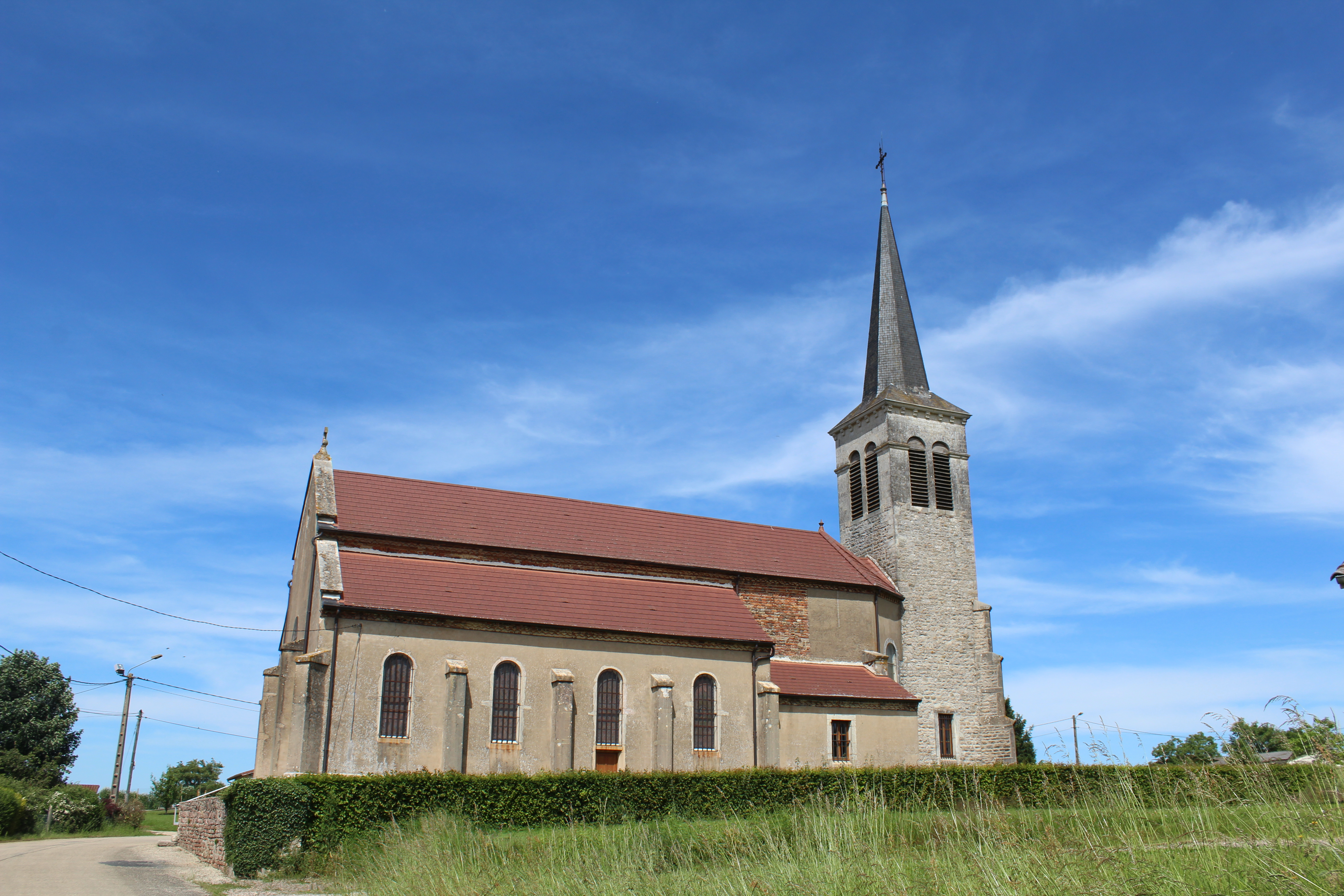 Église Saint-Hilaire de Courtes.